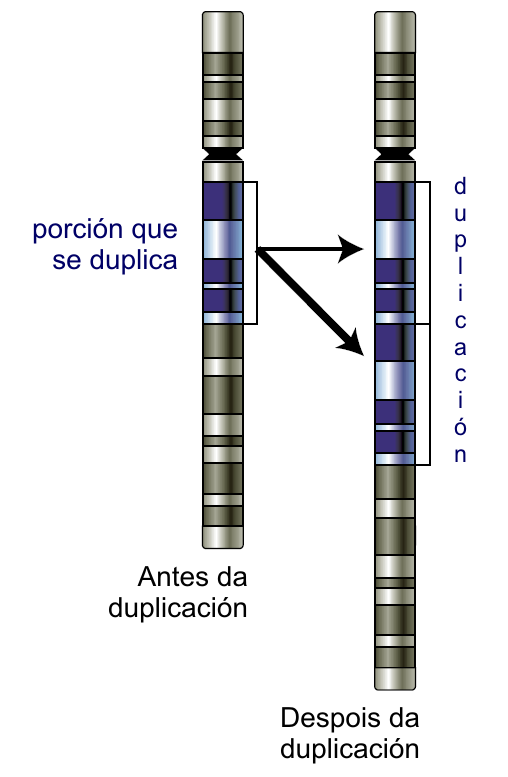 Diagrama dunha duplicación xénica.